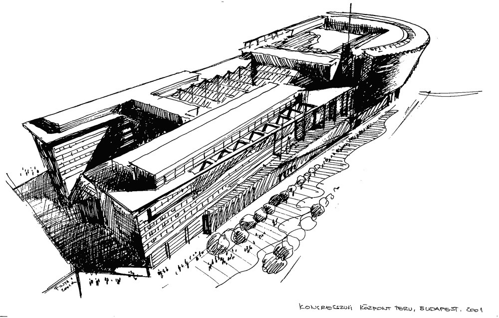 Skicc. A Kongresszusi Központ terve, Budapest